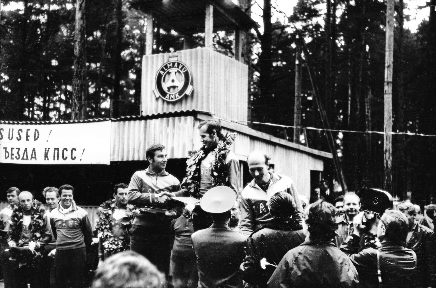 NLKP 24. kongressile pühendatud ringrajasõidu võistlus.